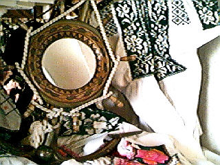 Artesanias campechanas.